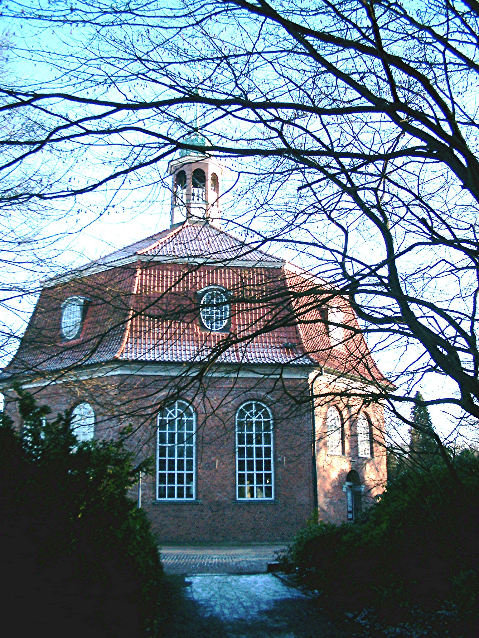 Beschreibung: Niendorfer Marktkirche (Hamburg-Niendorf) Quelle: selbst fotografiert Fotograf oder Zeichner: John N.